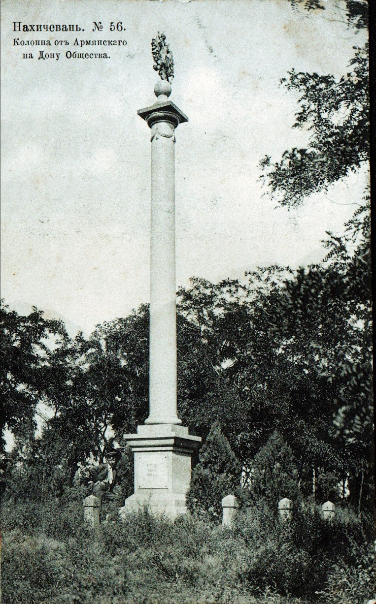 Александровская колонна в Нахичевани-на-Дону на дореволюционной открытке.